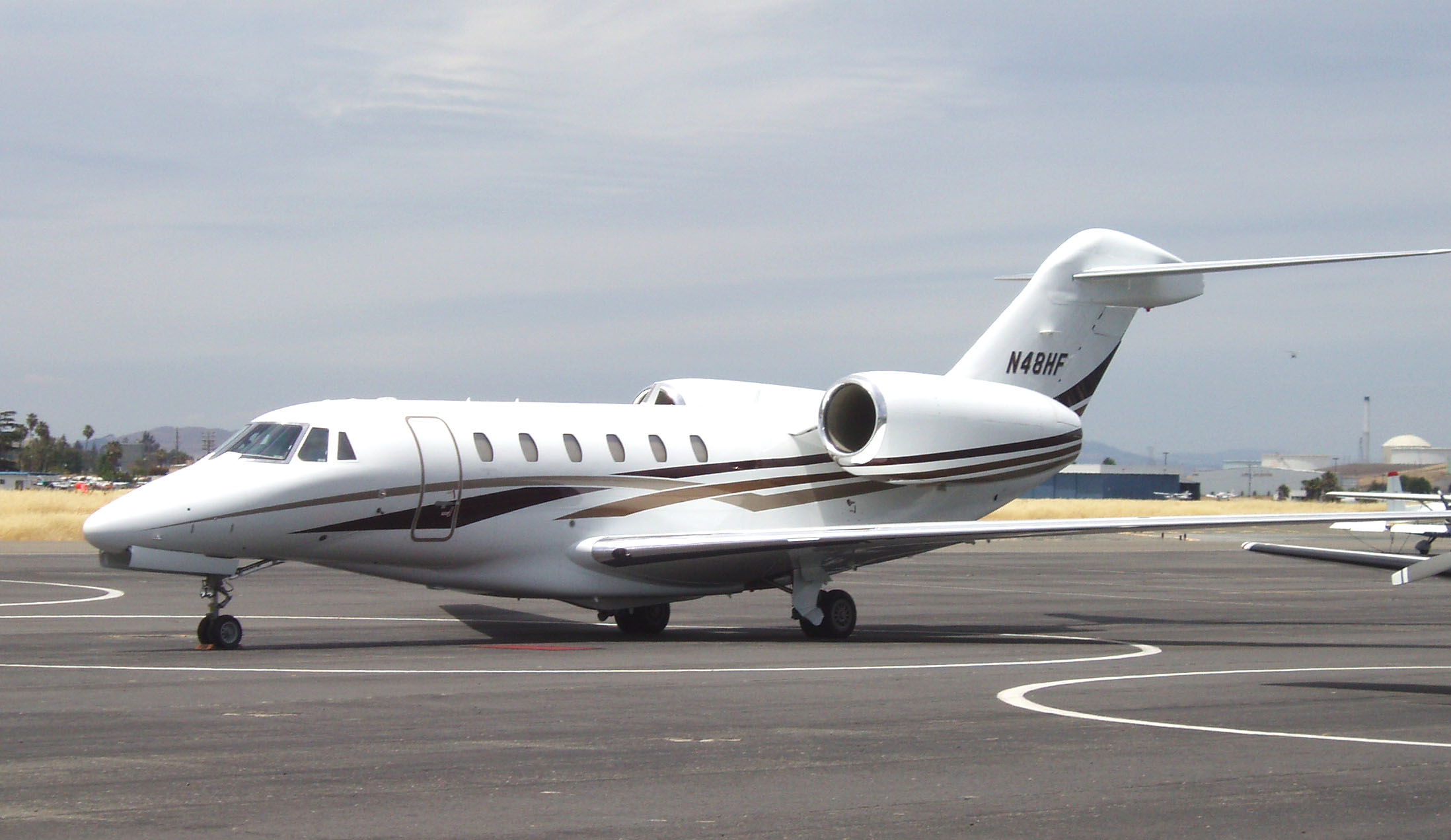 Cessna750